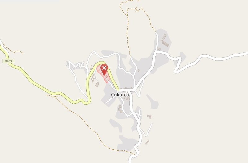 PKK terrorist incidents 1991-2016 (Çukurca Jandarma Karakolu) Çukurca Gendarmerie Station in Hakkari This map of Çukurca, Hakkari was created from OpenStreetMap project data, collected by the community. This map may be incomplete, and may contain errors. Don't rely solely on it for navigation.